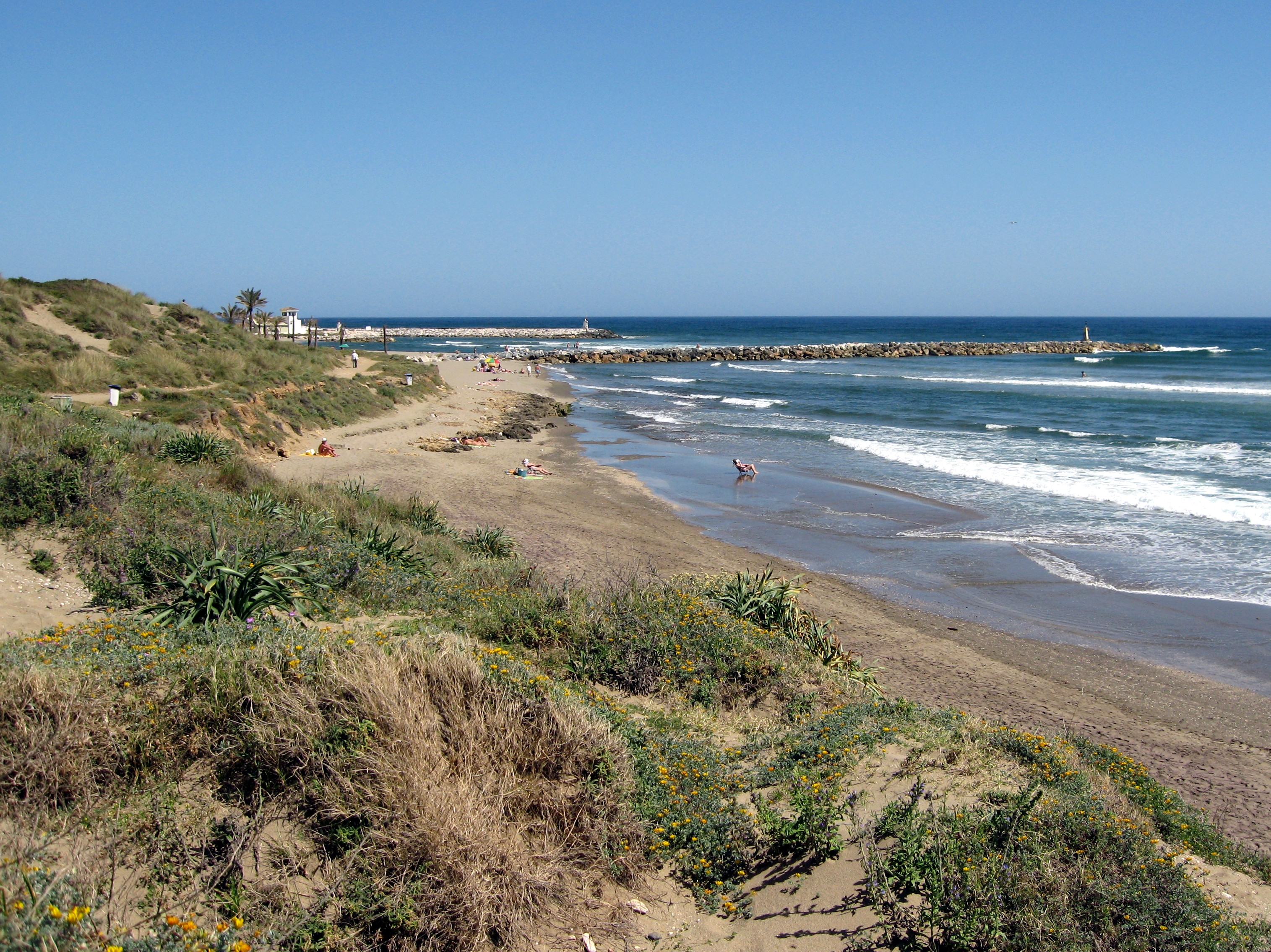 Strand von Cabopino, Ortsteil von Marbella, Provinz Málaga, Andalusien, Spanien